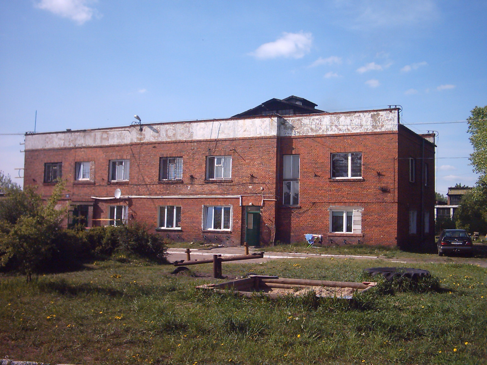 Osiedle Chemiczna - budynek biurowy Fabryki Chemicznej z lat 20-tych XX w. Hajnówka